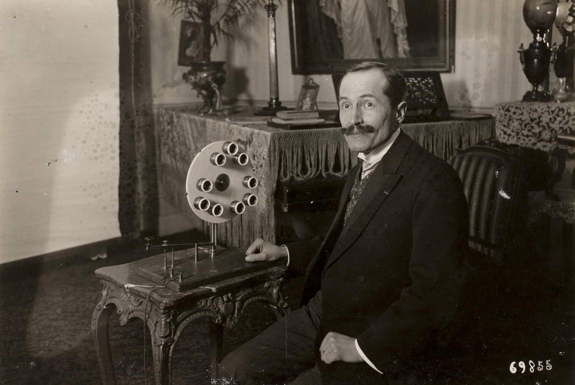 M. Dussand, l'inventeur de la lumière froide.